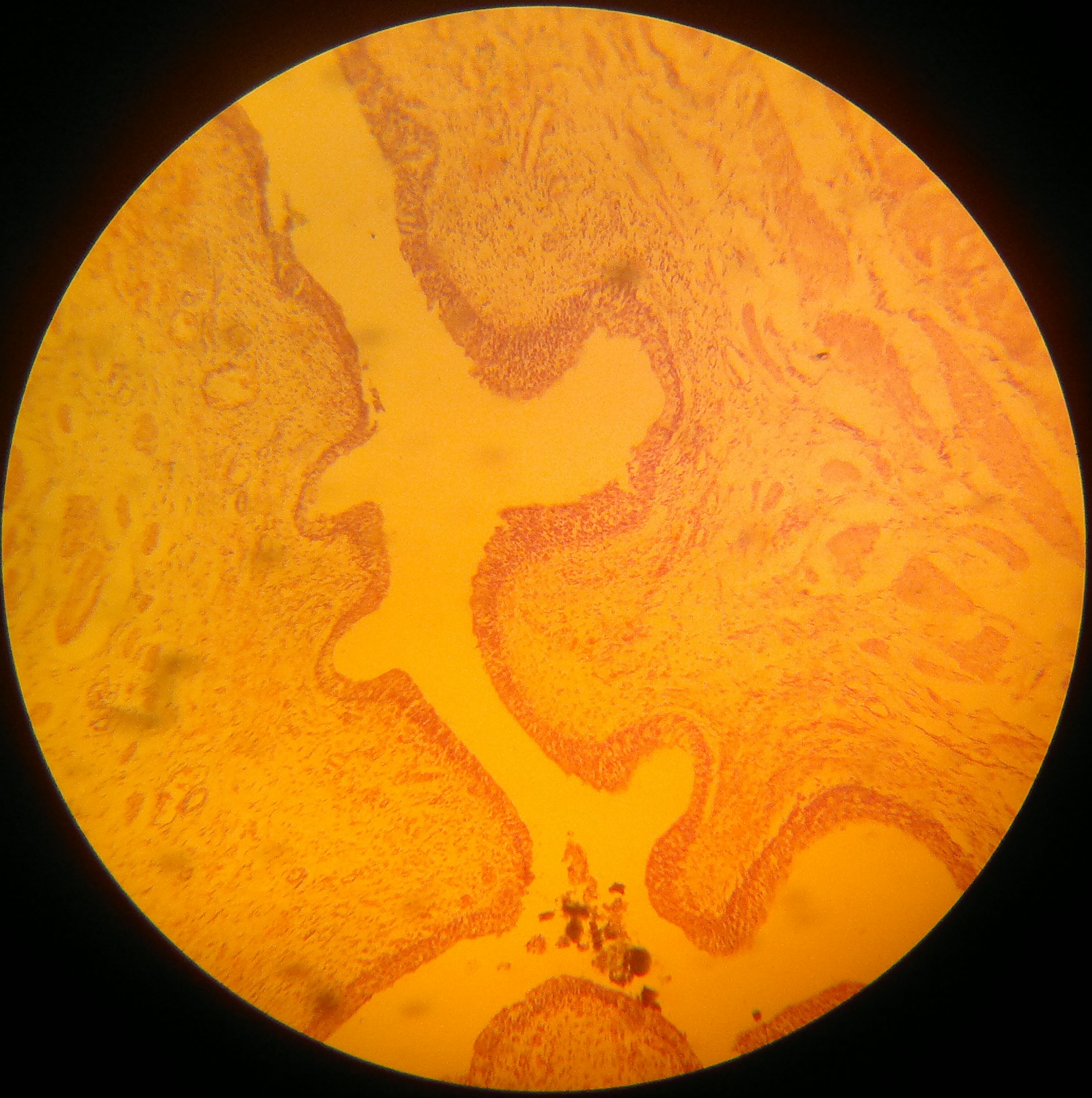 Transitional strat. epith.